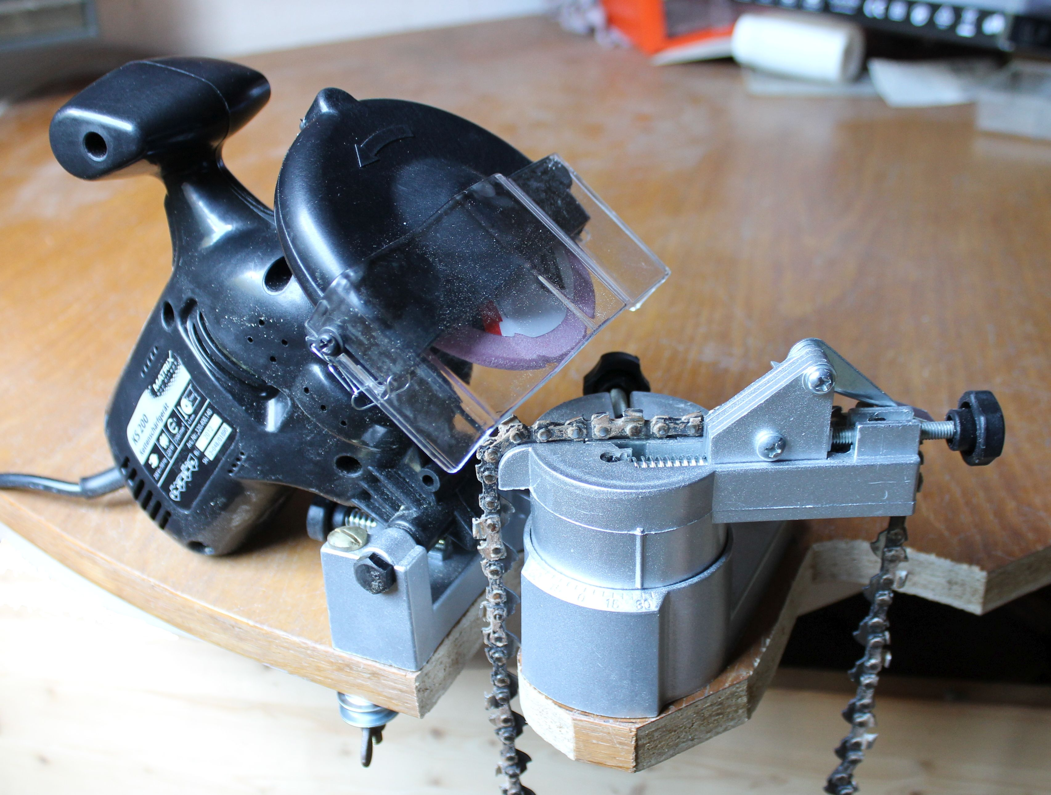 Kettenschärfmaschine für Sägeketten